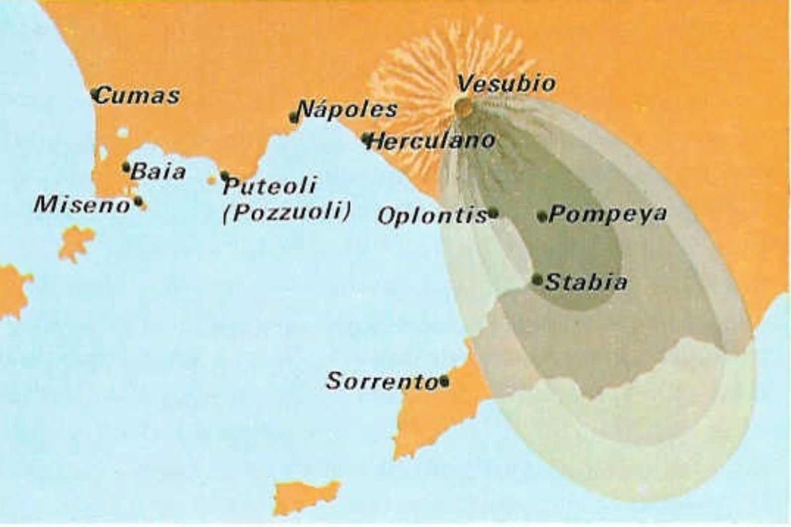 El Vesubio y su alcance de cenizas y humo